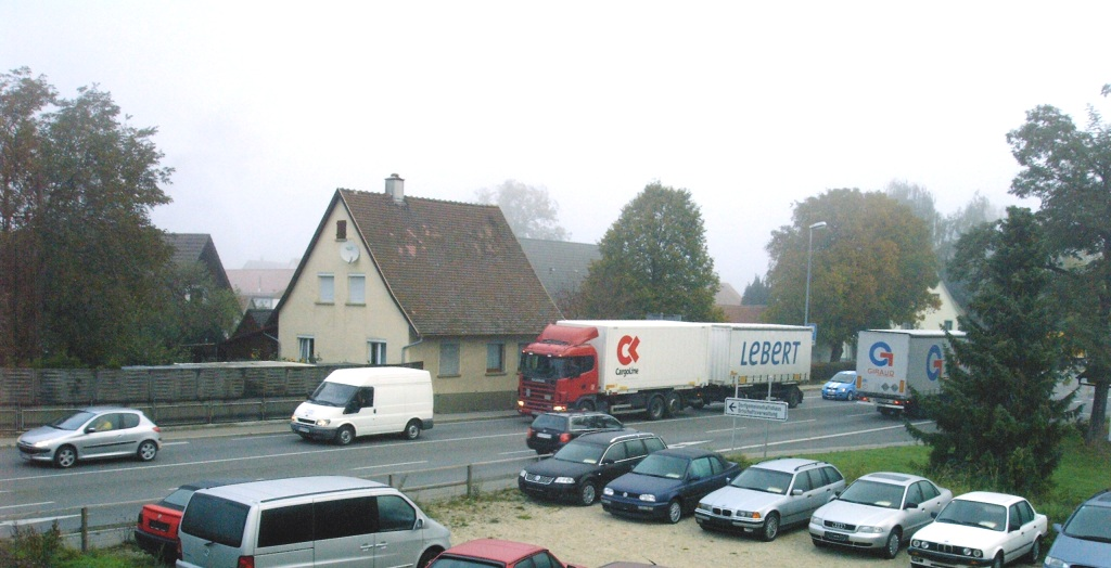 Bundesstraße 30 Ortsdurchfahrt Gaisbeuren in der Ortsmitte von oben zur Demonstration wie nahe die Bundesstraße an manchen Häusern vorbeiführt.